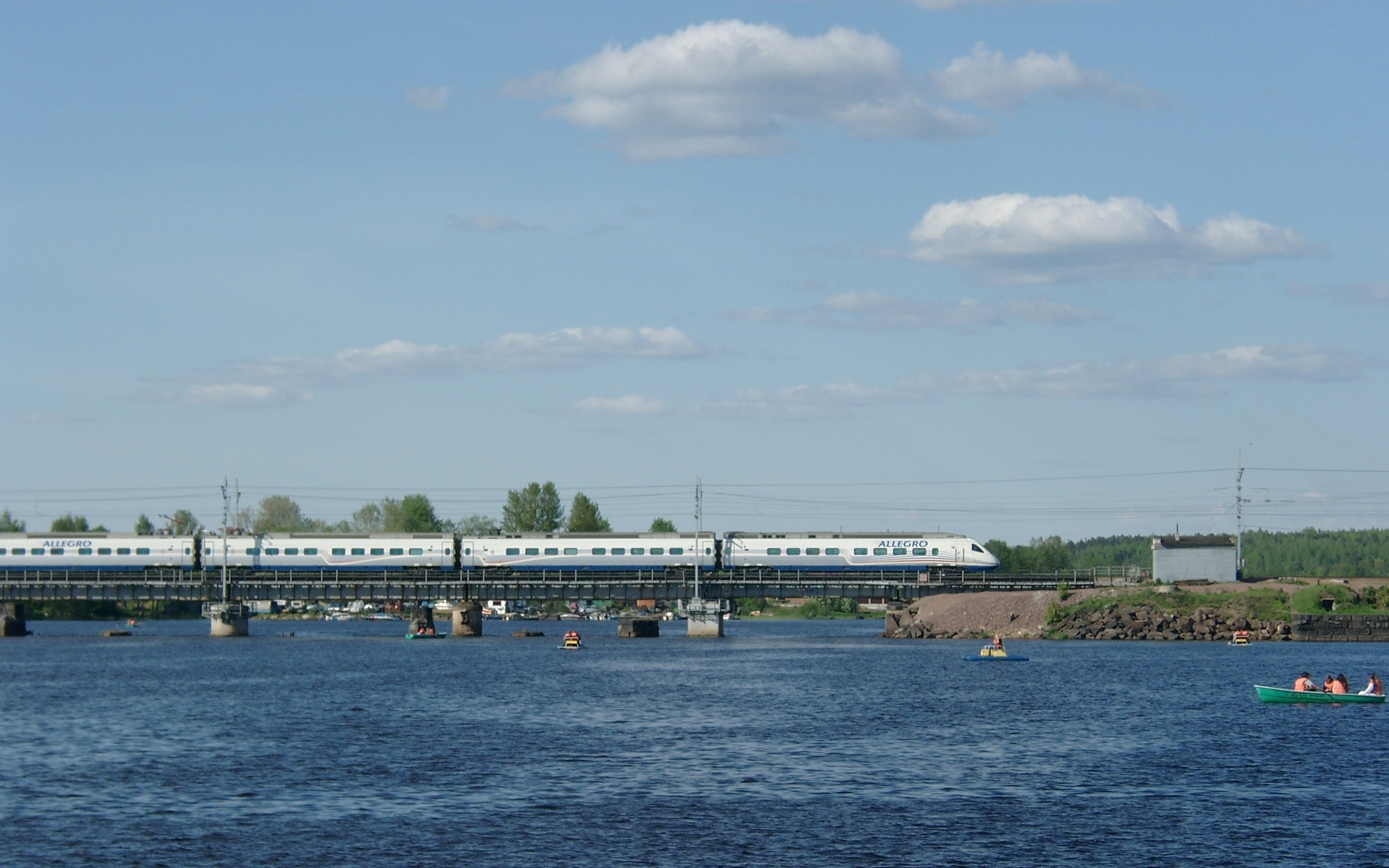 Скоростной поезд «Аллегро» на Финляндском мосту (г. Выборг, Ленинградская область) прибывает на станцию Выборг.